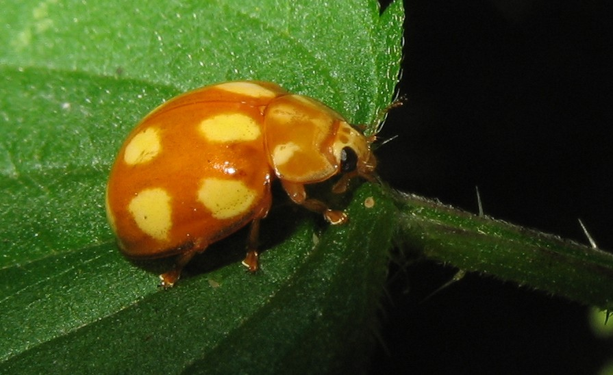 Calvia decemguttata, location Zabrze, Poland